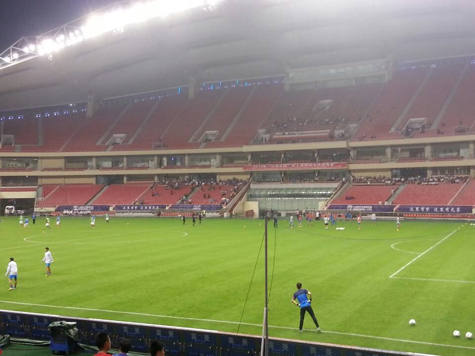 2013年上海国际足球邀请赛 上海申花对庆南FC